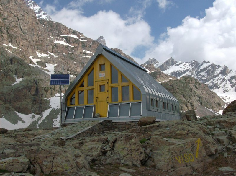 Foto del Bivacco Boarelli (Laghi delle Forciolline, Monviso) come appare salendo dalla Gola delle Forciolline